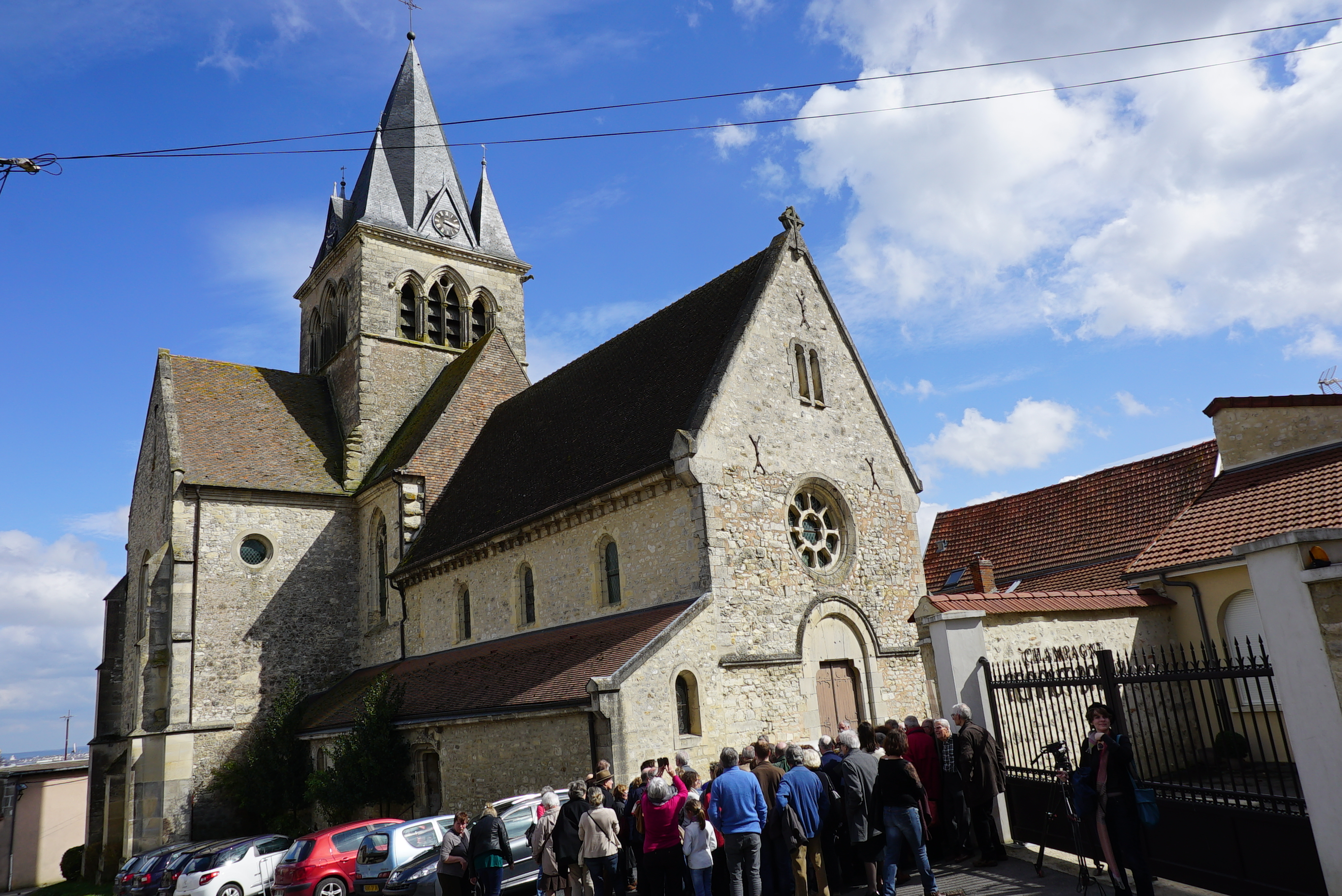 eglise saint-lié à Villedommange. Visite animé par une personne du parc.